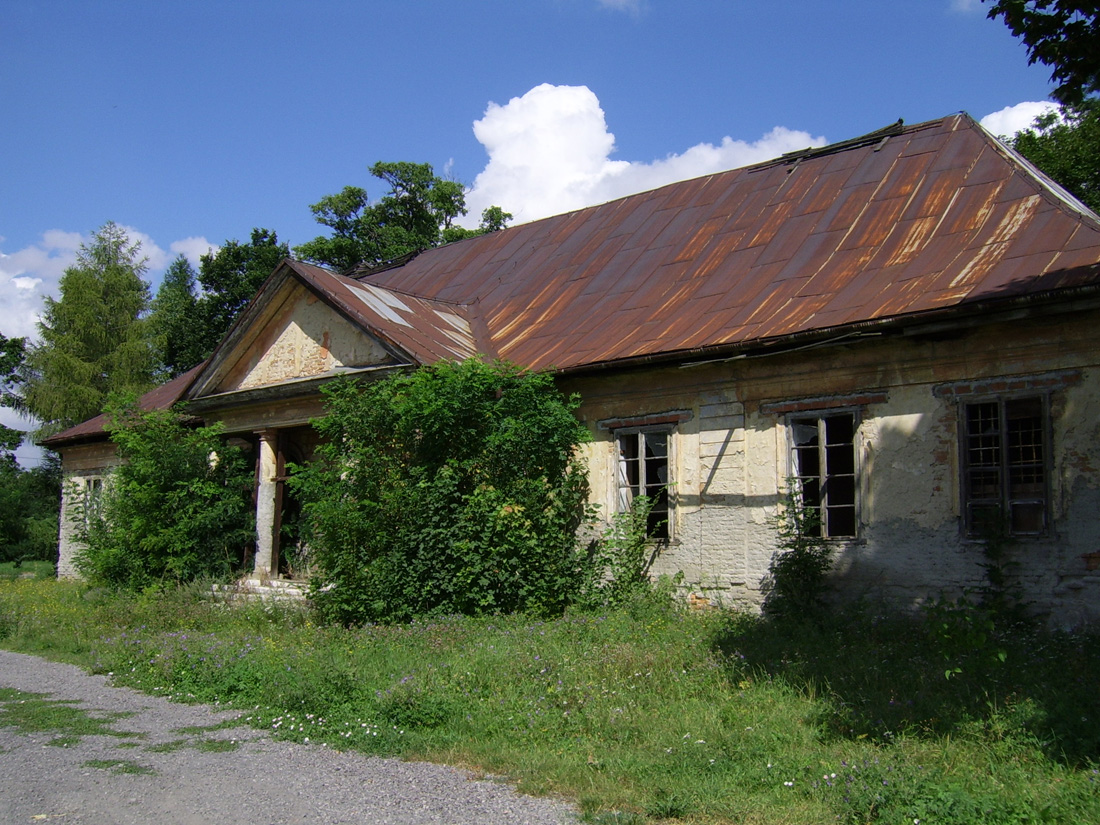 Nadzów - Dwór z XIX wieku.